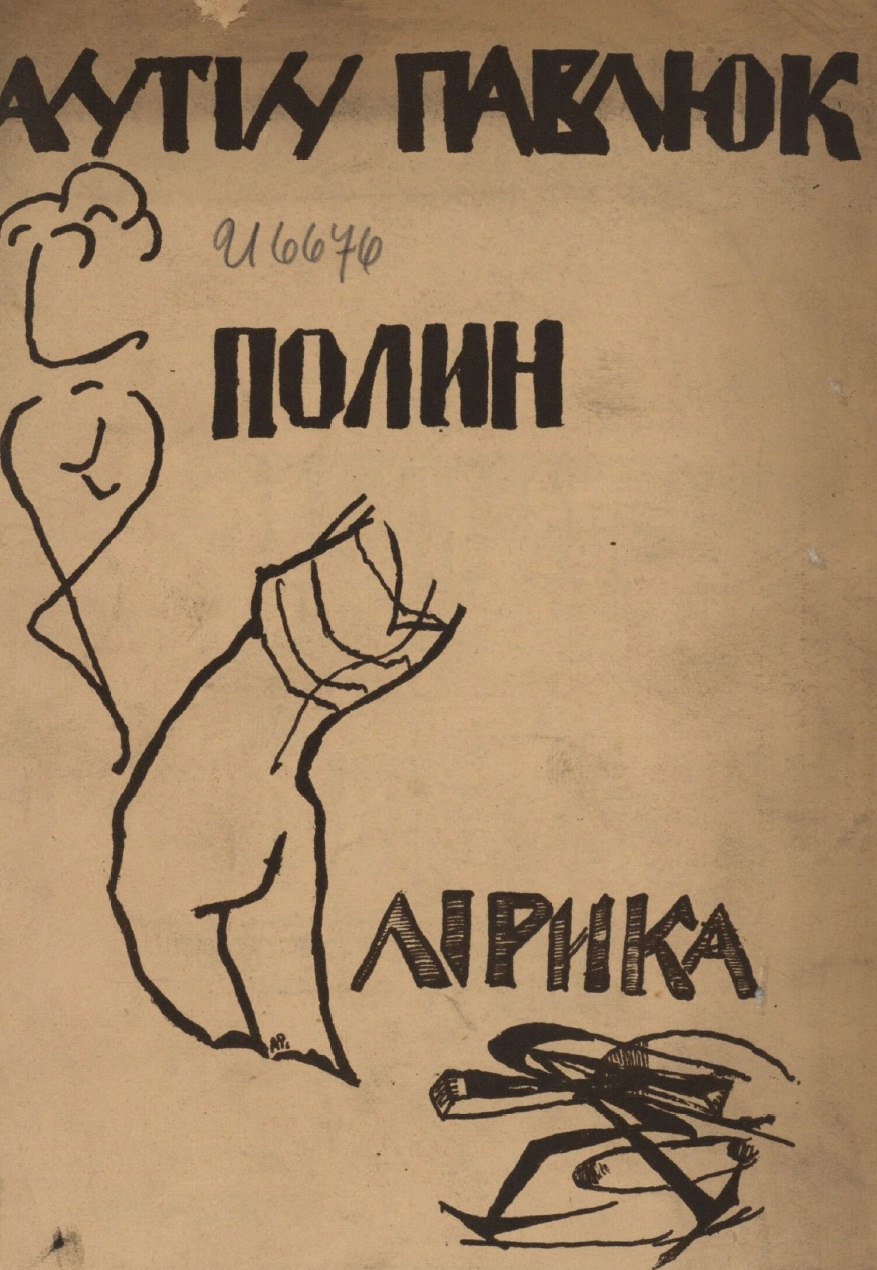 Література